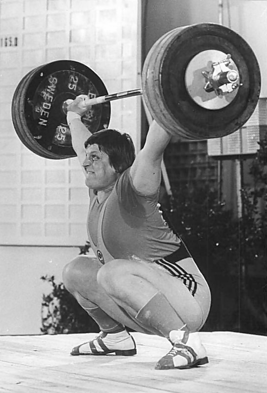 Leonid Taranenko ADN-ZB Haßler-06.07.1986 UdSSR: Weltrekord durch Taranenko-Bei den UdSSR-Meisterschaften der Gewichtheber in Lipezk sorgte der 30jährige Superschwergewichtler (110kg) Leonid Taranenko (Foto von einem früheren Wettkampf) für einen neuen Weltrekord. Er brachte im Zweikampf 467,5 kg zur Hochstrecke.